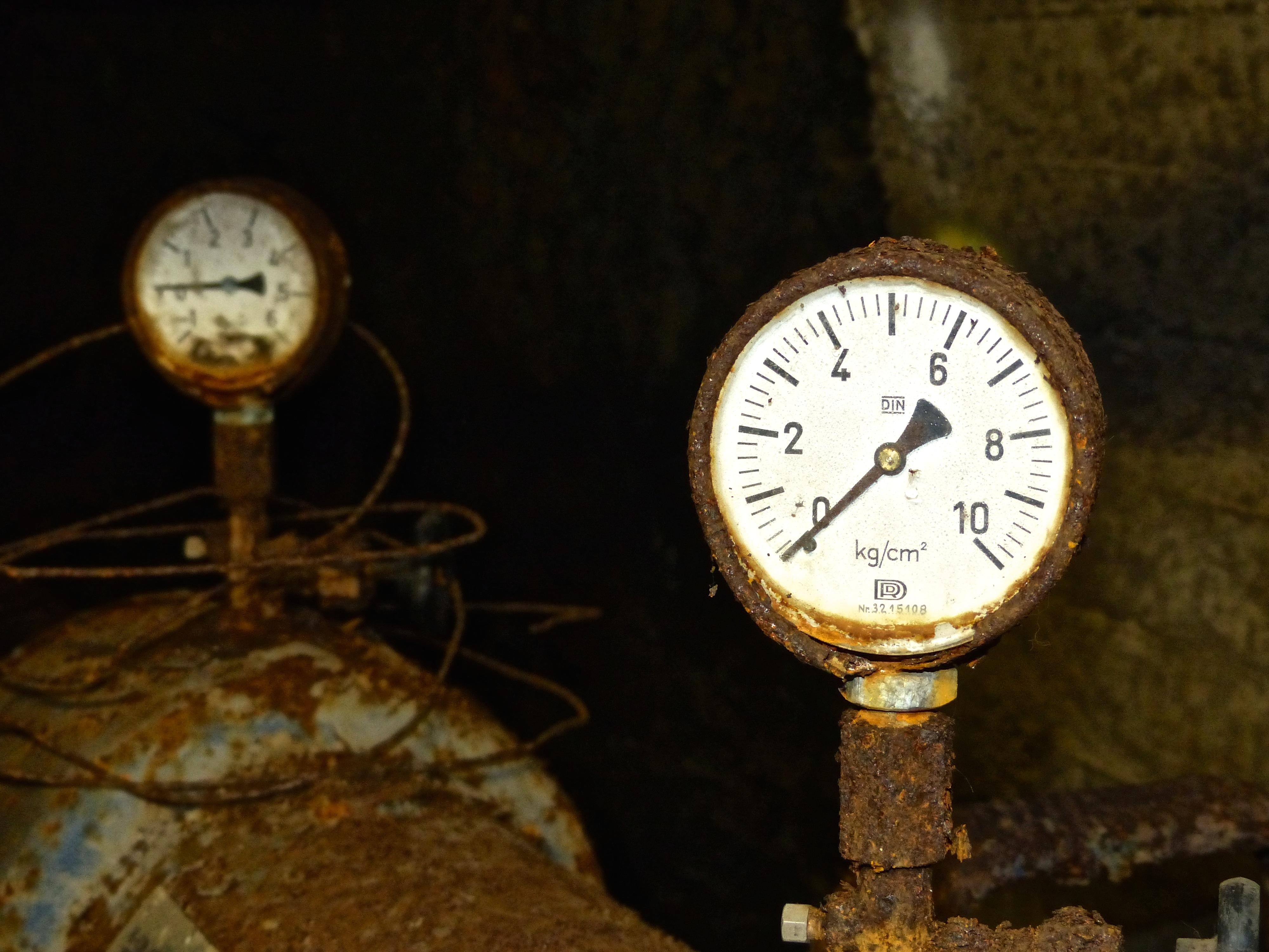 Kilianstollen Marsberg (Grube Oskar): Manometer an einem Kompressor